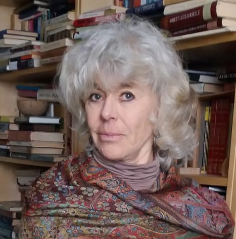 Leena Rantanen